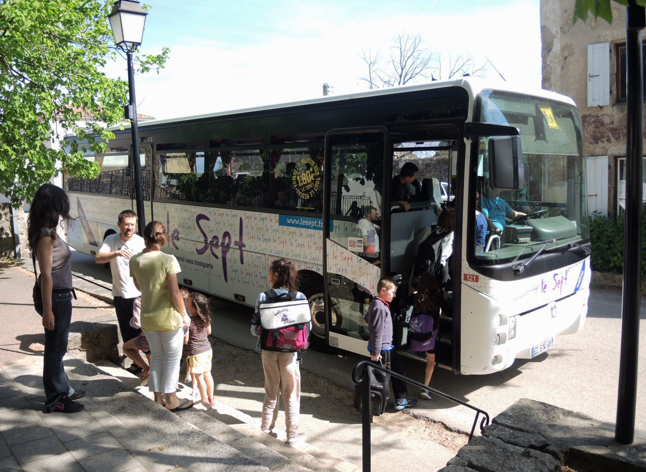 Colombier-le-Cardinal détail